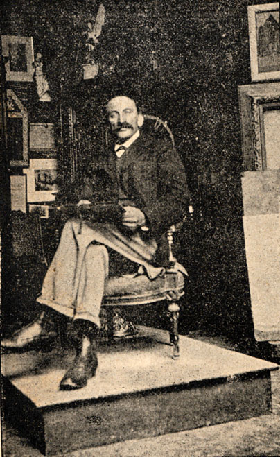 Alphonse Lévy, également connu sous le pseudonyme de Saïd, né à Marmoutier (Bas-Rhin) le 8 janvier 1843, mort à Alger le 2 février 1918, est un peintre, illustrateur et caricaturiste français. Il est connu pour avoir dépeint la vie de la communauté juive en Alsace et en Algérie.